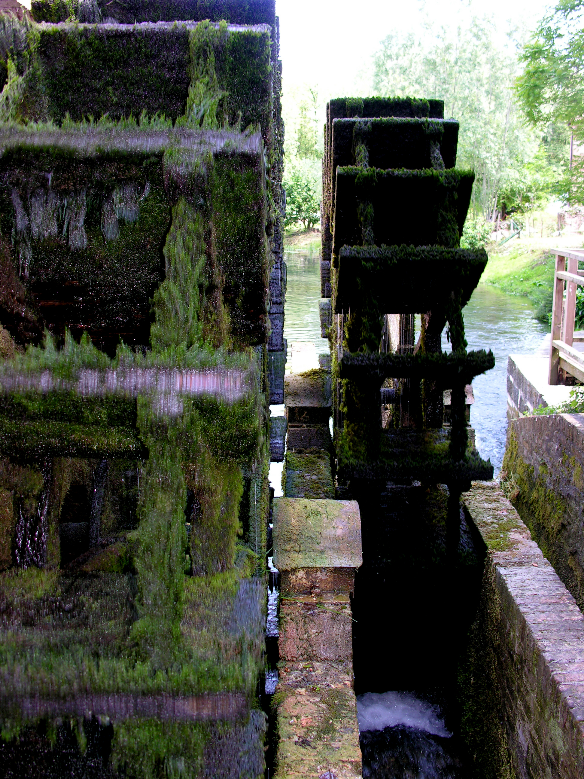 Dettaglio delle ruote del Mulino di Cervara.